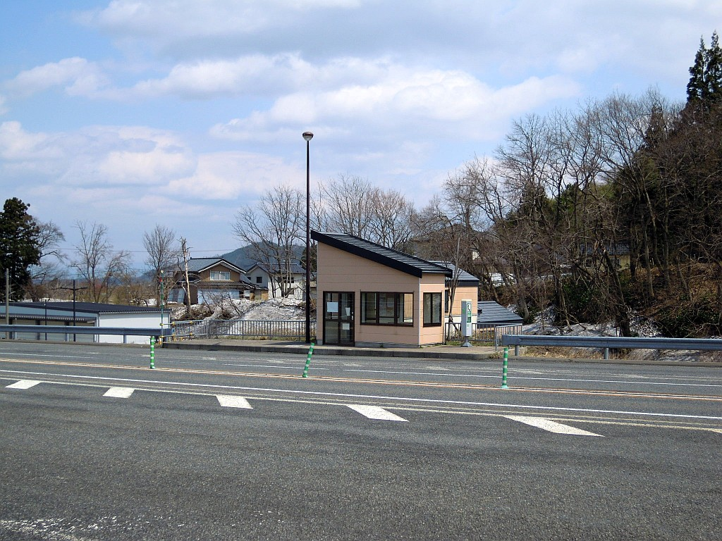 山形自動車道に設置されている庄内あさひバスストップ（上り線側）を下り線側から